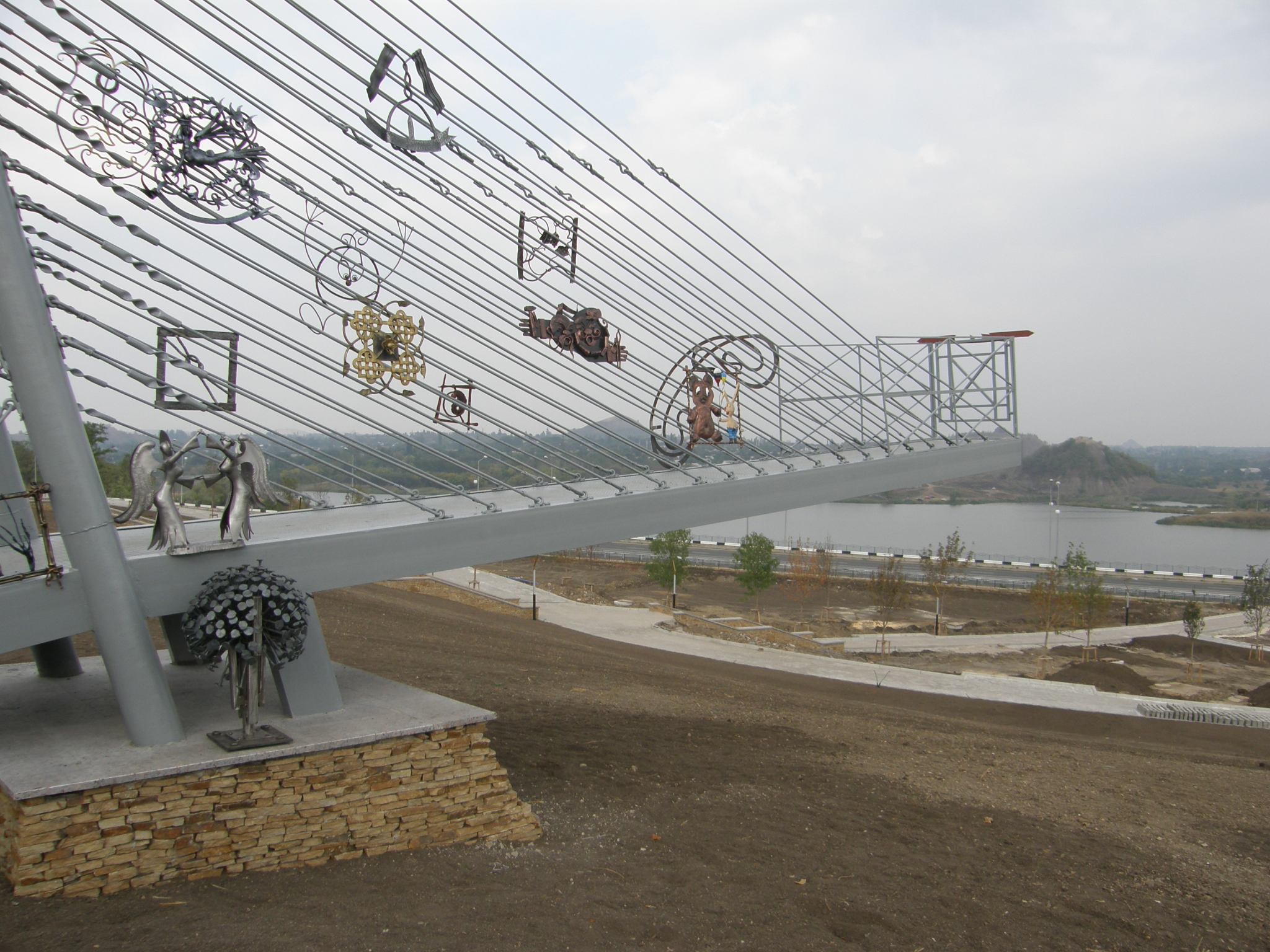 Открытие моста дружбы на 12 кузнечном фестивале в Донецке